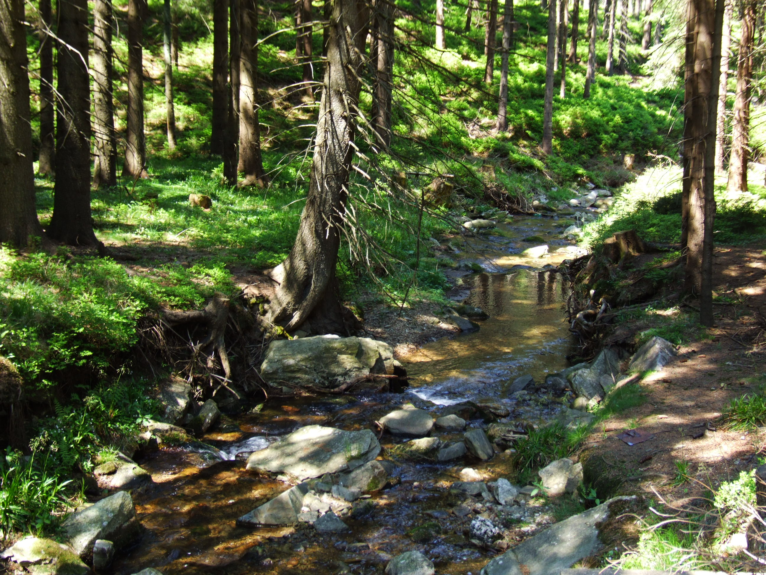 Černá Opava u "ruského hrbitova" a Opavské chaty